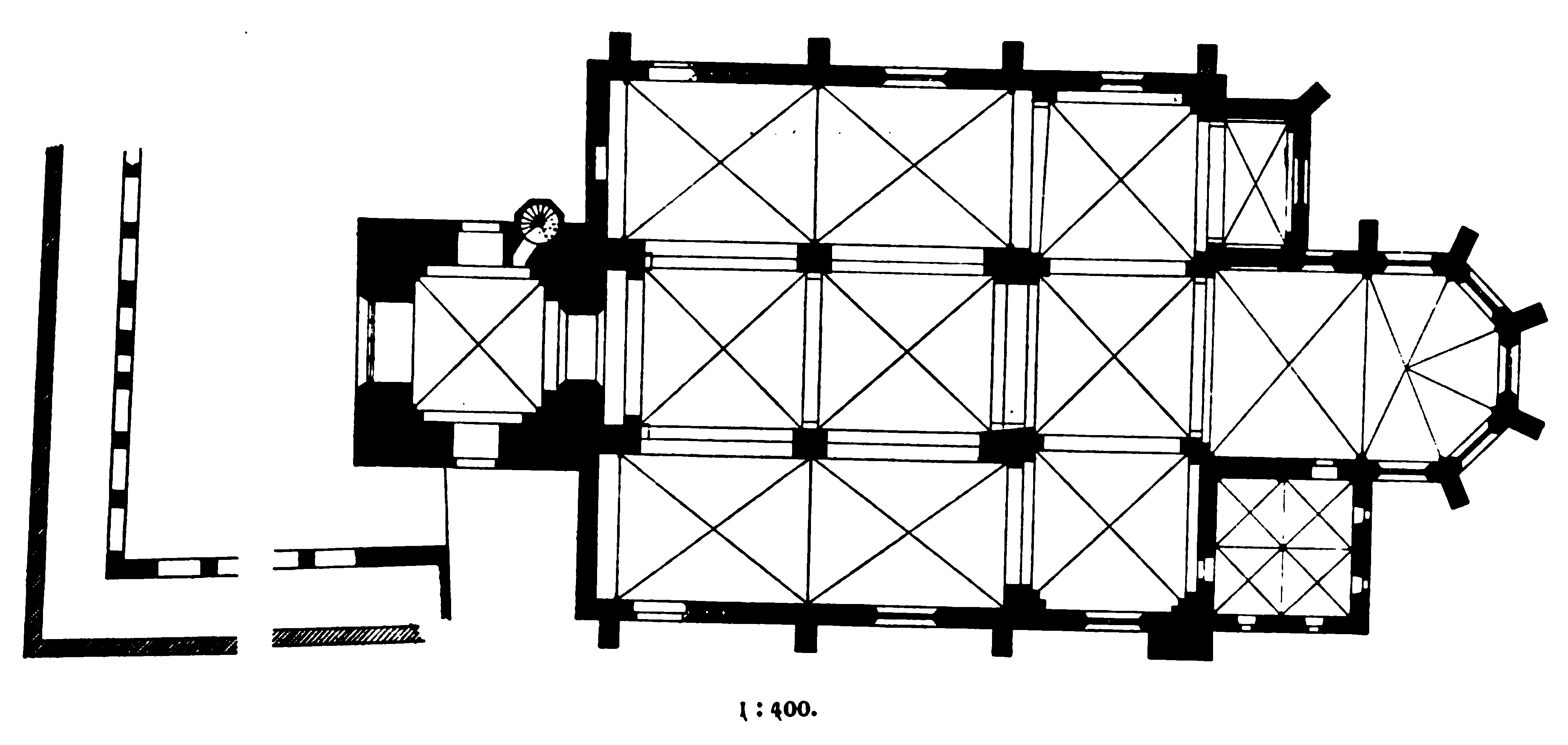 Grundriss der Kirche St. Marien in Minden